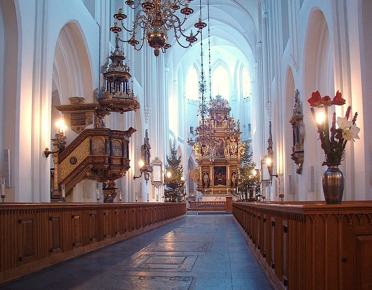 Sankt Petri kyrka, Malmö, Sweden, interior from entrance Date: December 2005